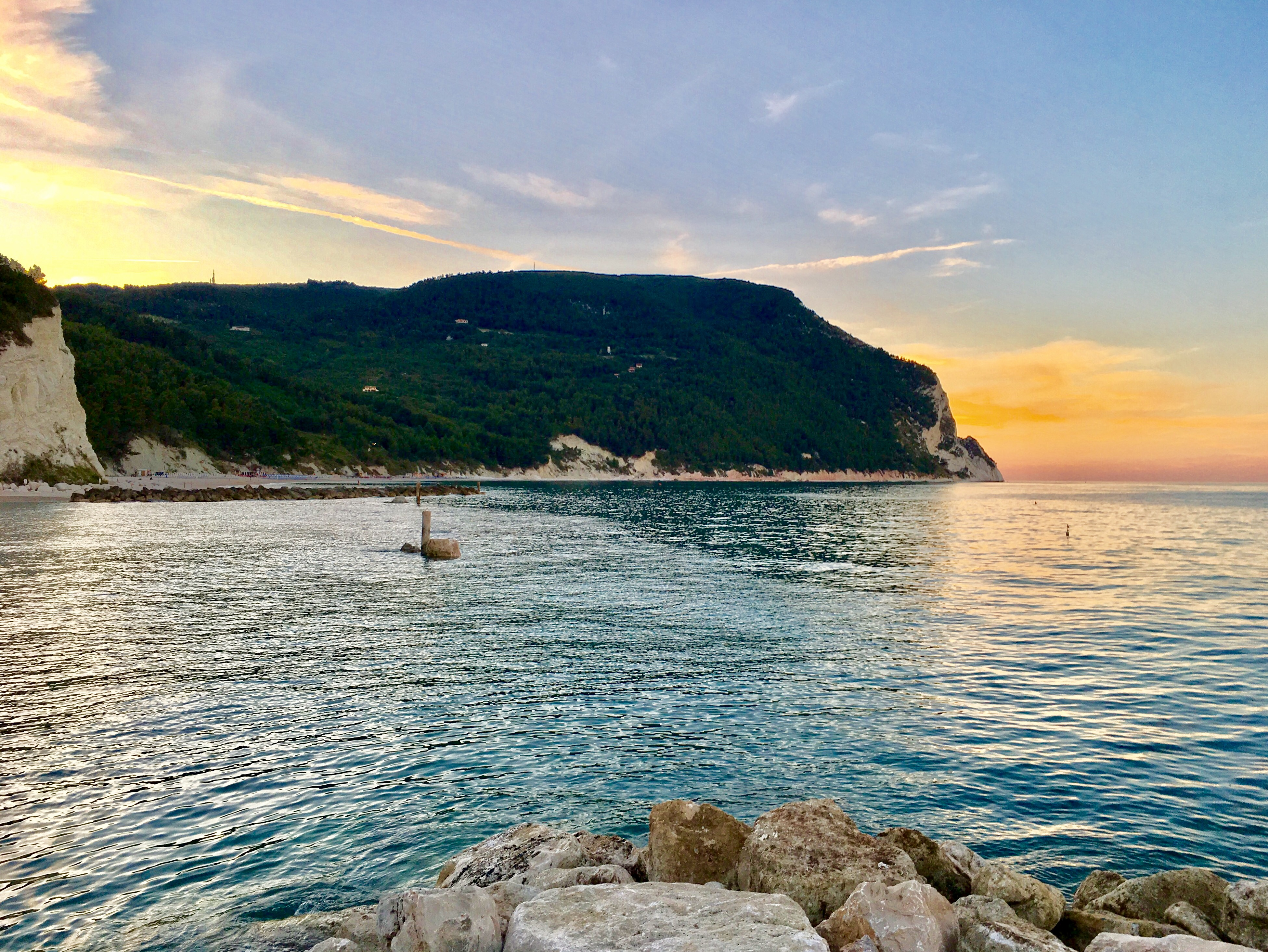 Monte Conero visto dalla spiaggia Urbani al tramonto